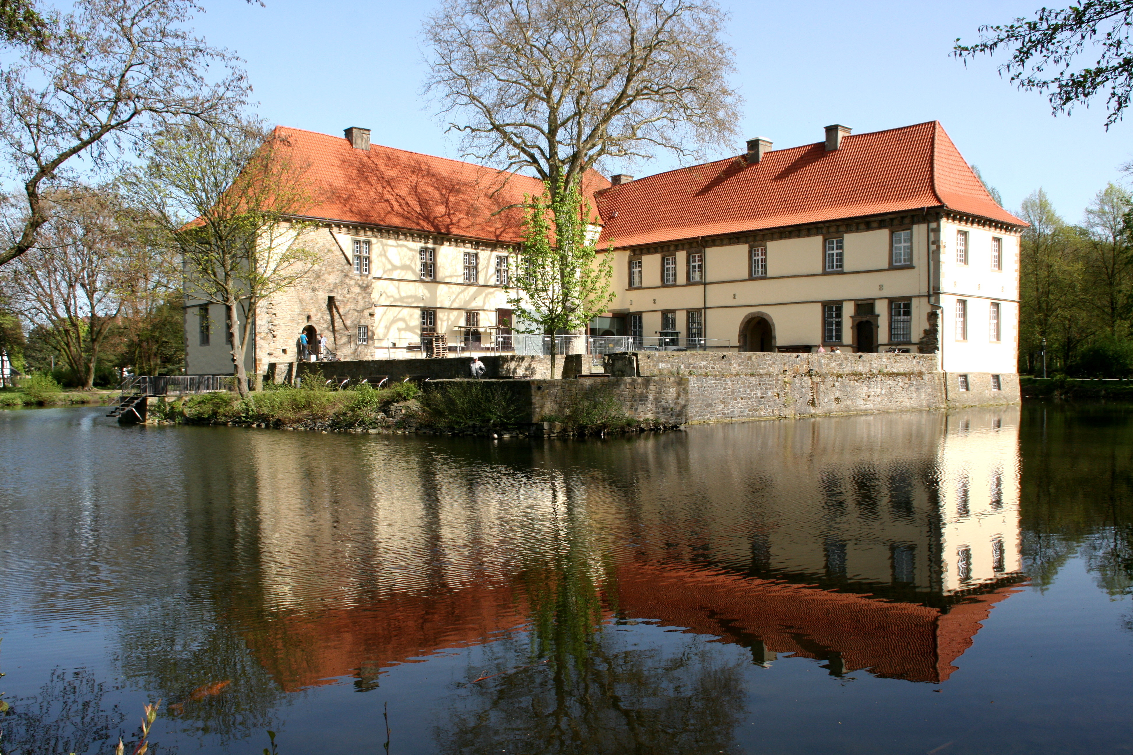 Schloss Strünkede, Karl-Brandt-Weg 5, Schlosspark Strünkede in Herne